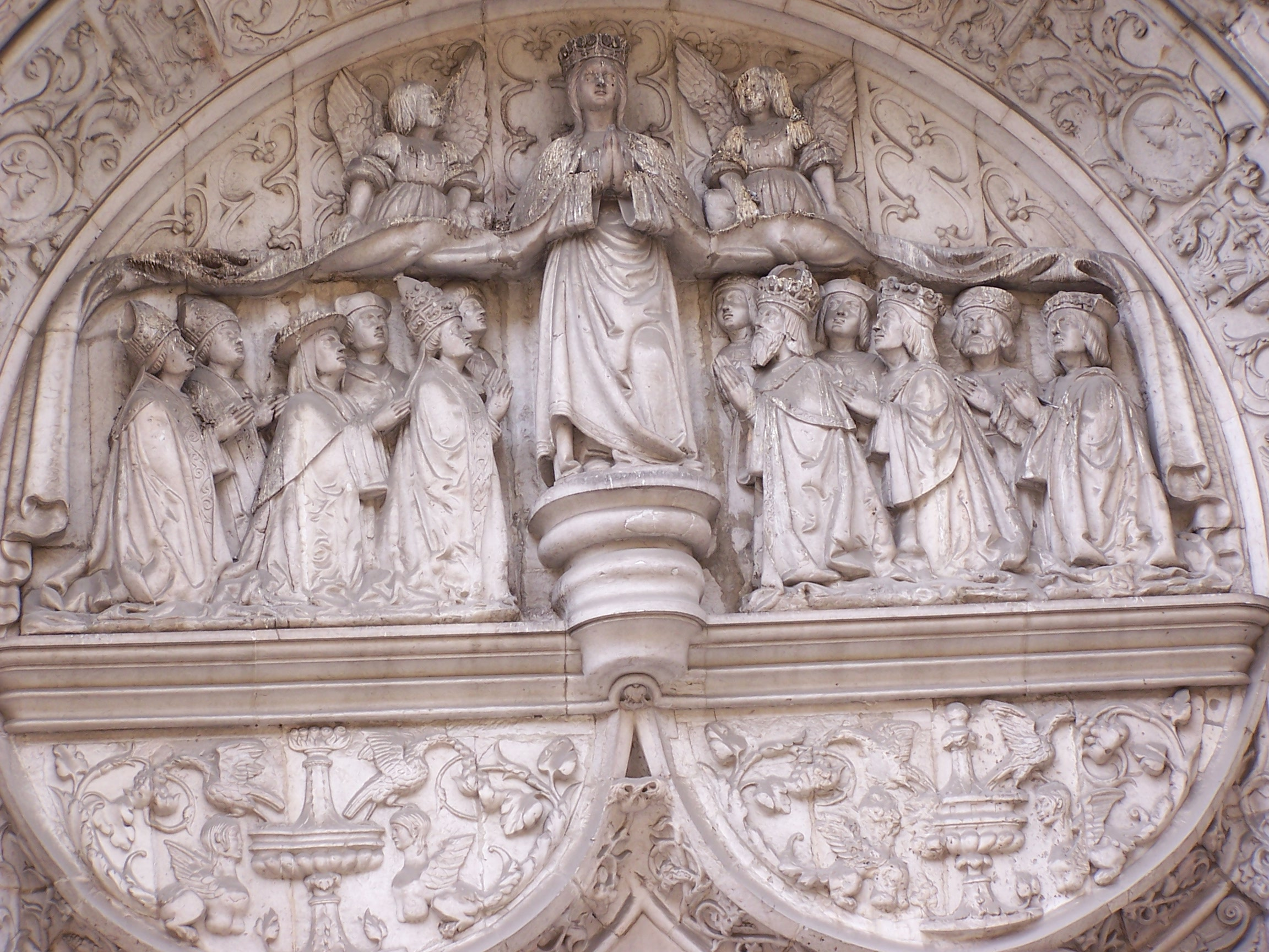 Pediment of Igreja Conceiçao Velha in Lisbon, Portugal